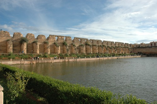 Sehrij swani